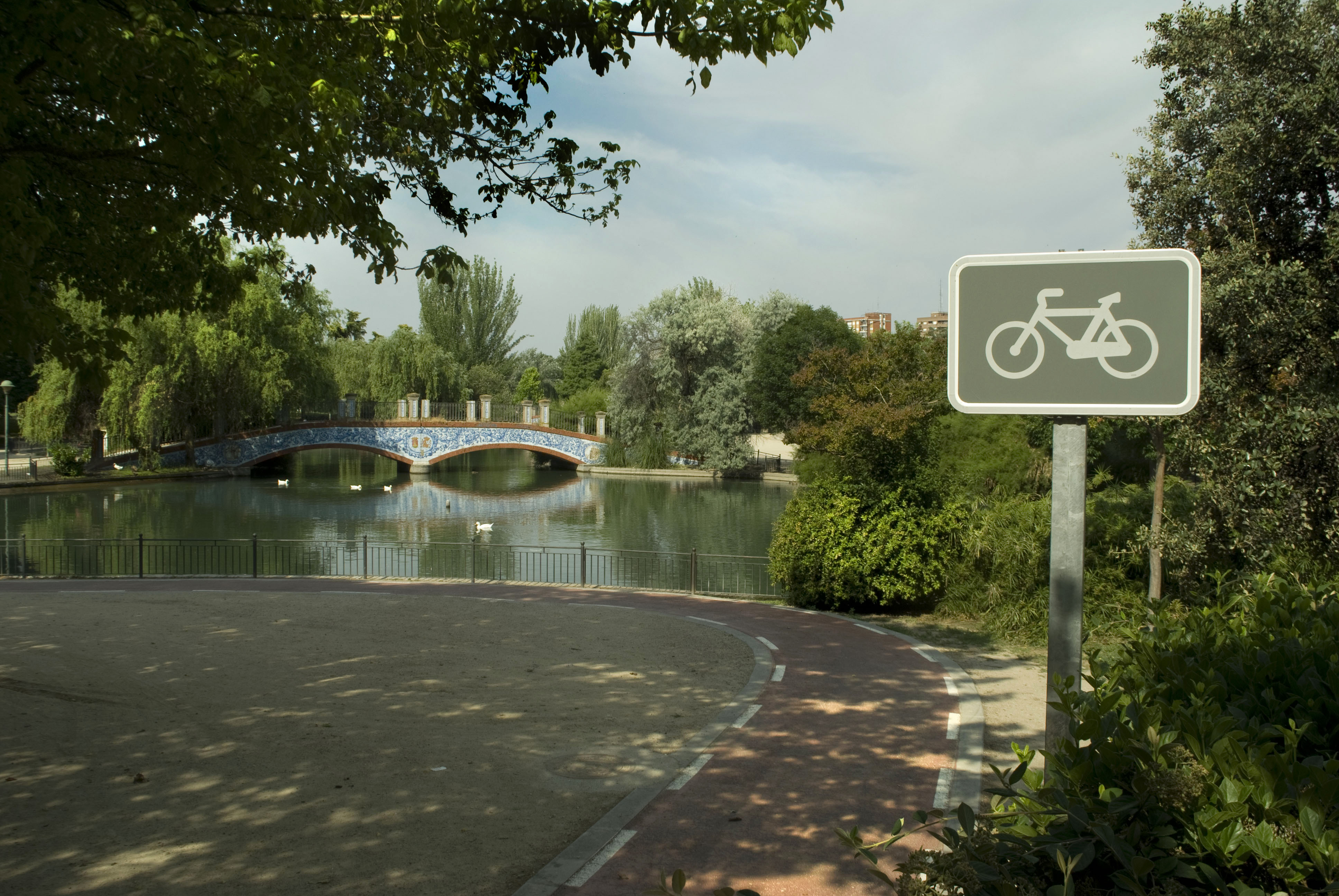 Carril bici entrando en el parque de La Alameda en Talavera de la Reina